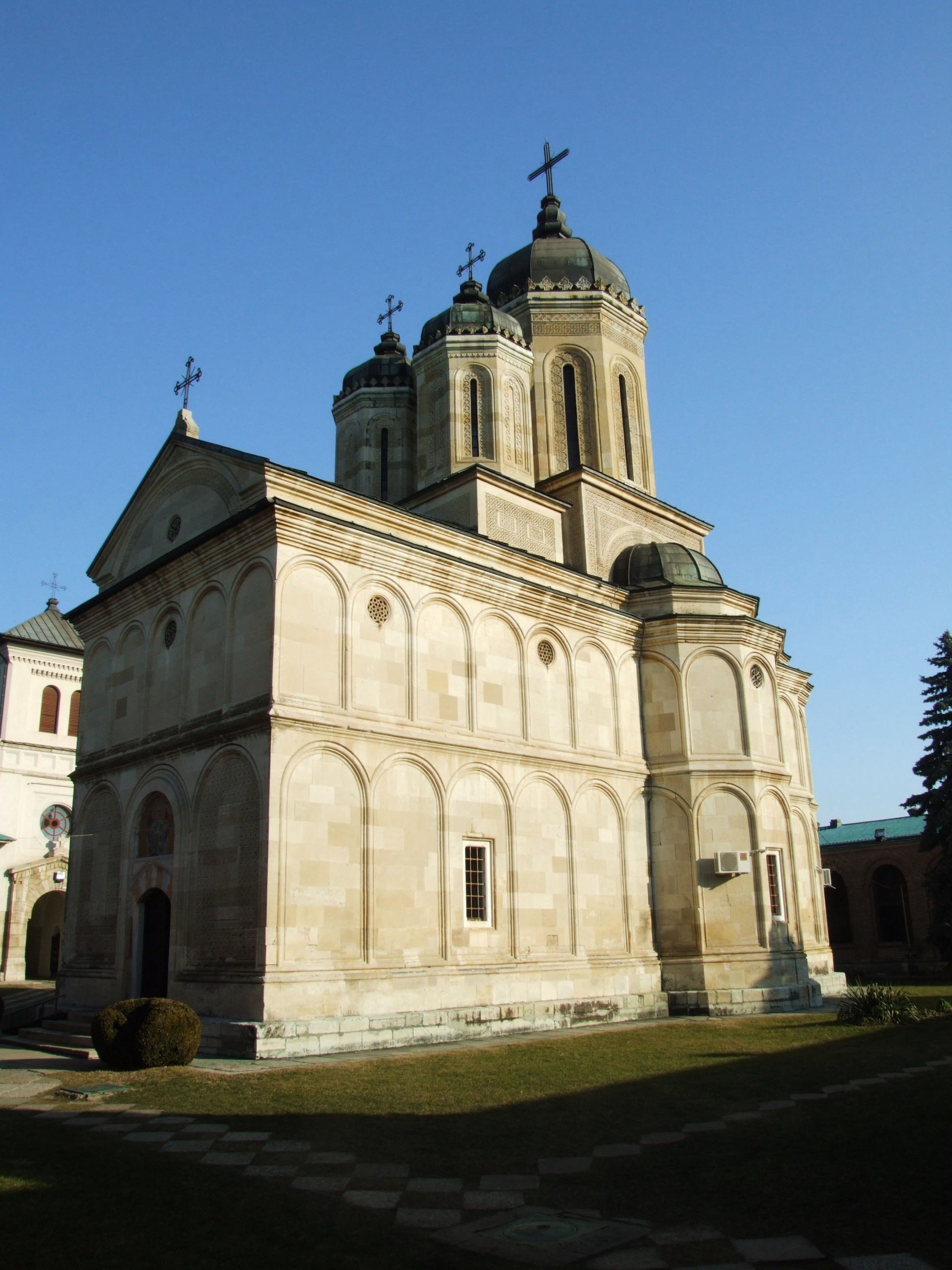 Dealu Cloister